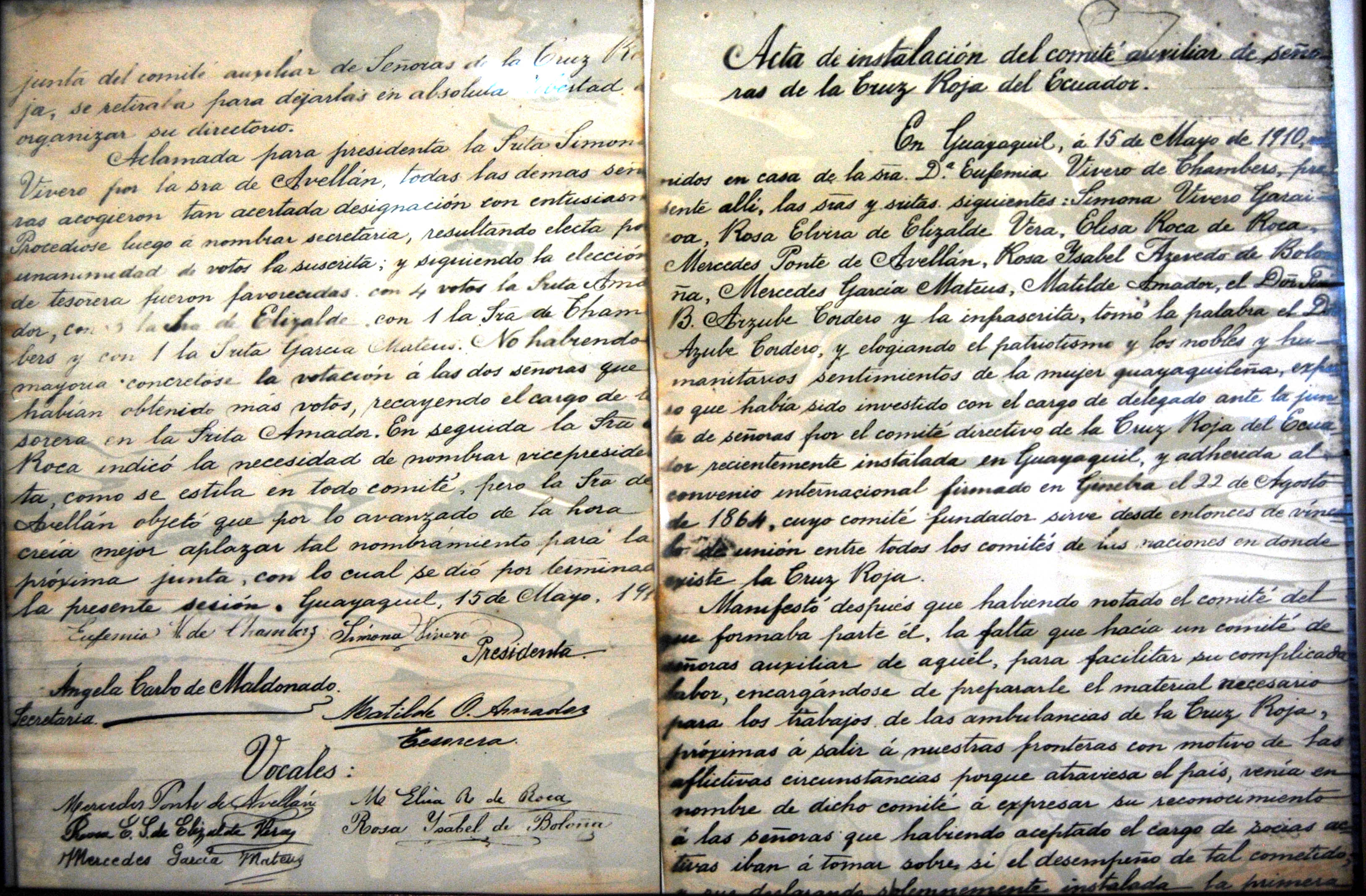 Documento manuscrito de Acta de Constitución del Comité de Damas de la Cruz Roja Ecuatoriana en 1910, conformado en la ciudad de Guayaquil